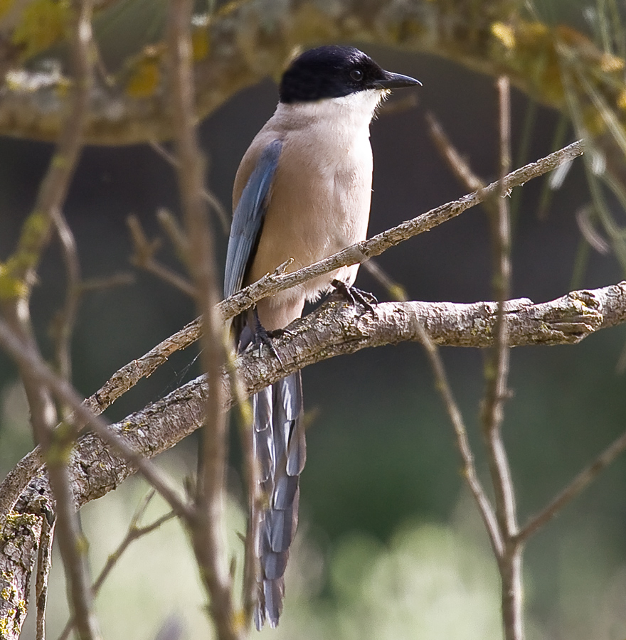 Blauelster (Cyanopica cooki) aufgenommen in der Coto Doñana im Mai 2008